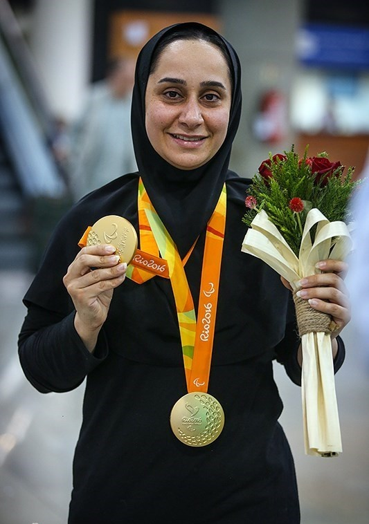 ورود کاروان ورزشکاران پارالمپیک به کشور